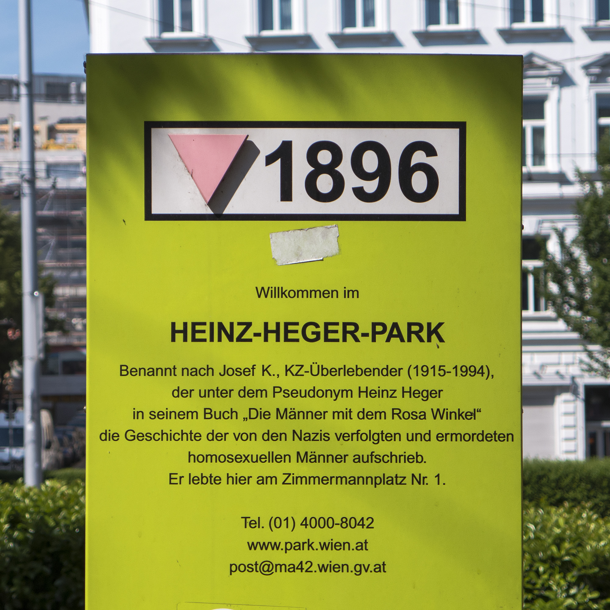 Heinz-Heger-Park in Wien 9